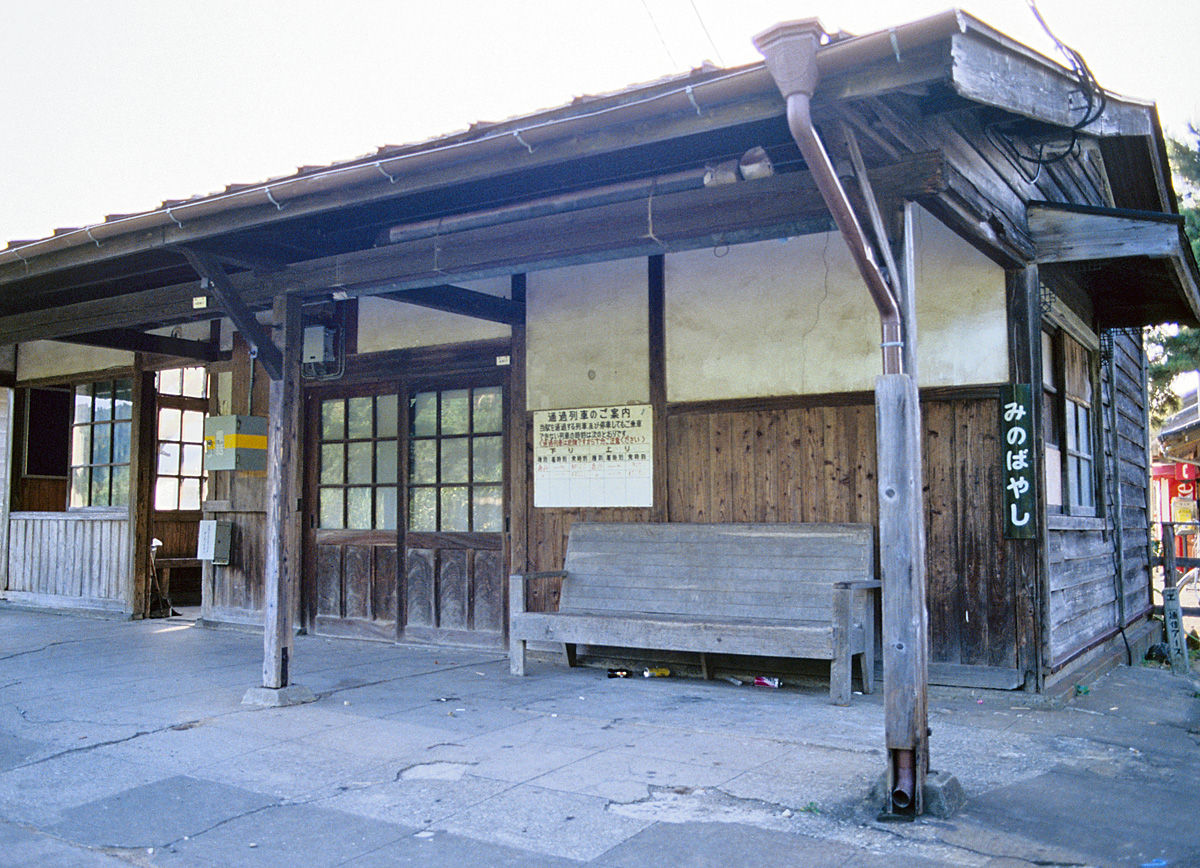 1985年の見能林駅